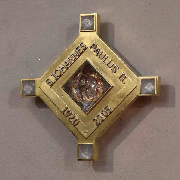 Reliquiar mit einer Blutreliquie des Papstes Johannes Paul II. im nördlichen Seitenschiff des Hohen Domes zu Paderborn. Enthüllt und gesegnet im April 2017.